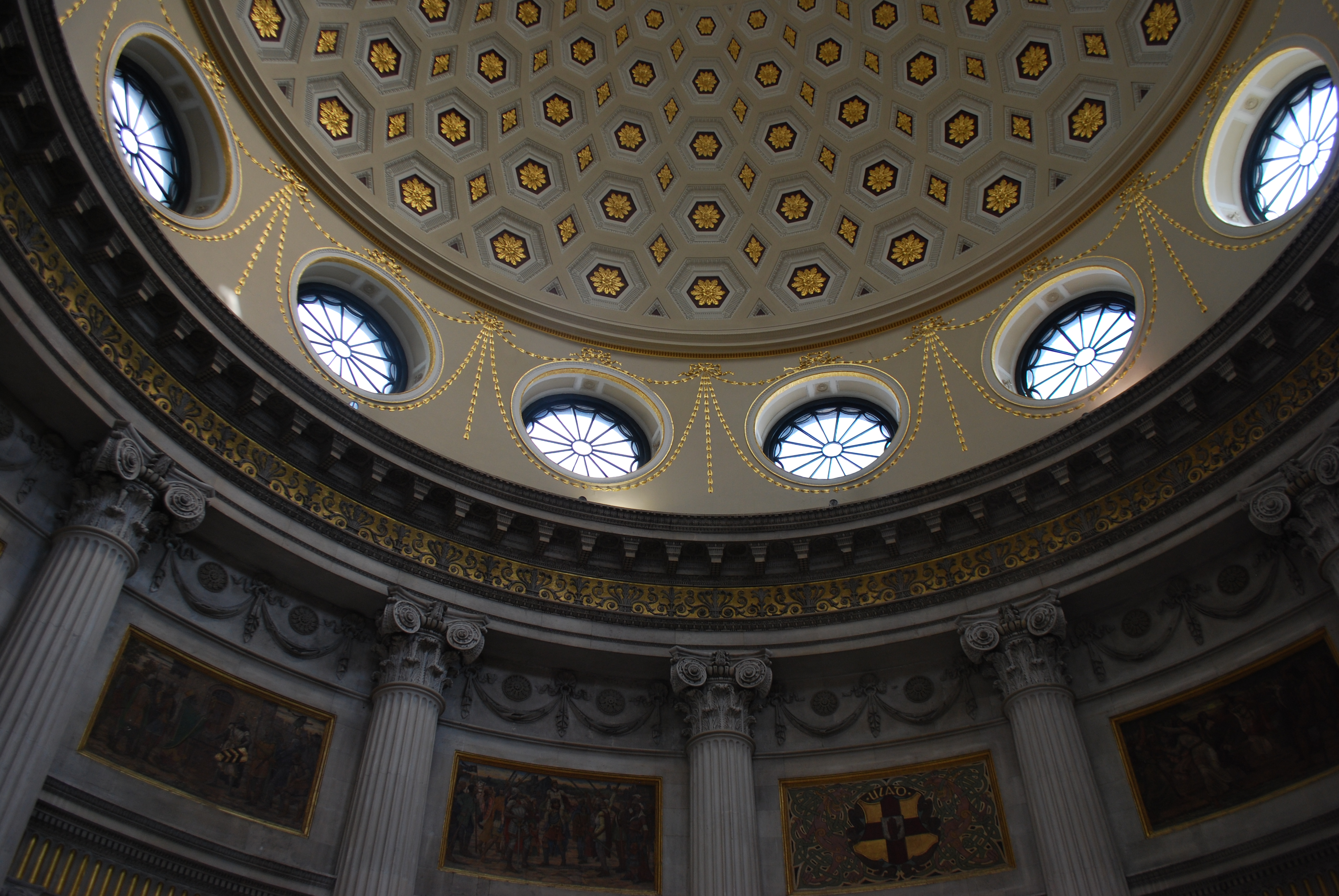 Vue de la rotonde du City Hall de Dublin.